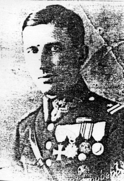 Franciszek Orawiec w mundurze majora z odznaczeniami.